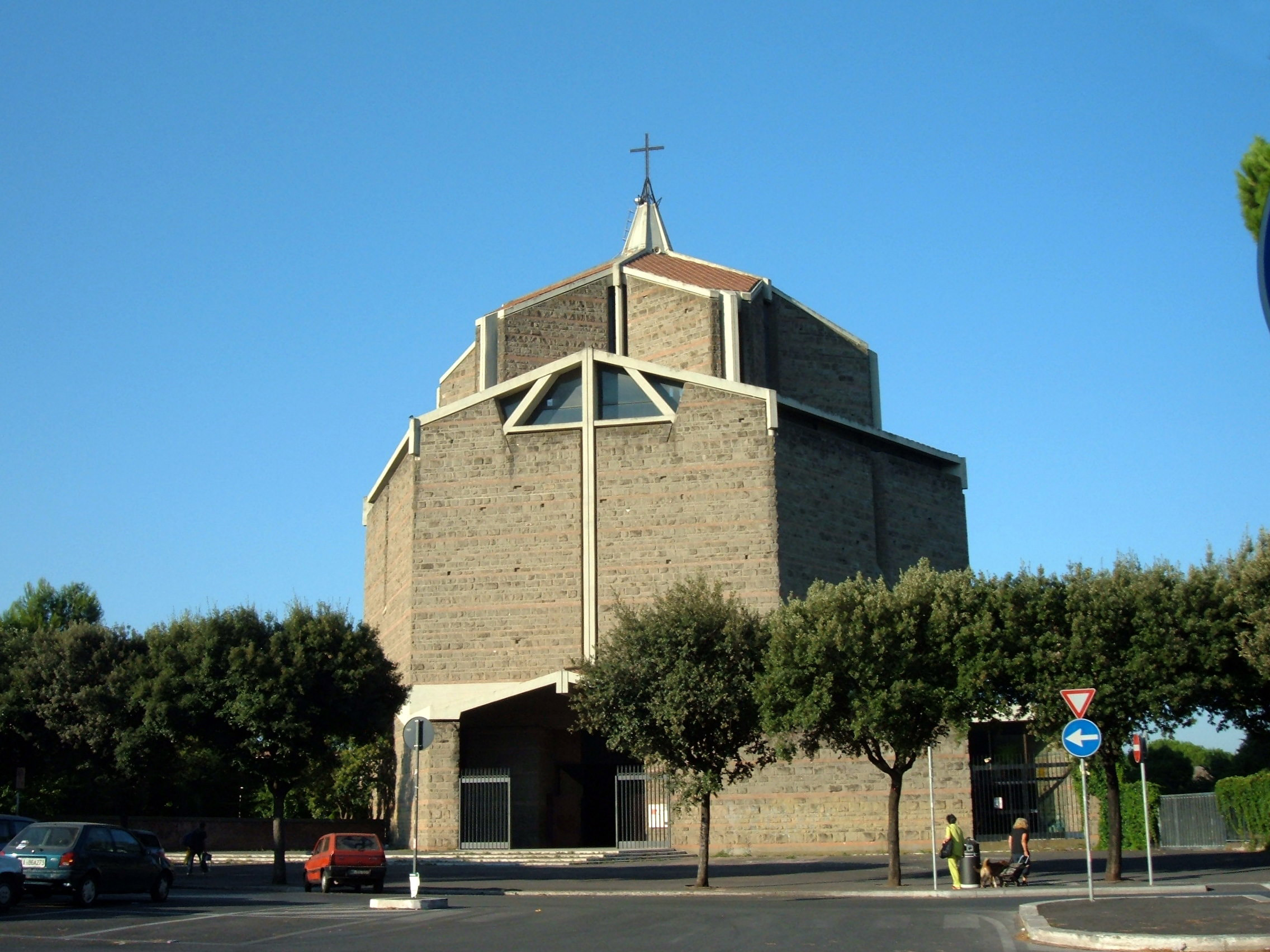 Chiesa di San Policarpo, a Roma, nel quartiere Appio Claudio.